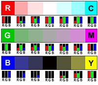 Käänteisväripareja ovat R - C (G+B), G - M (R+B) ja B - Y (R+G)